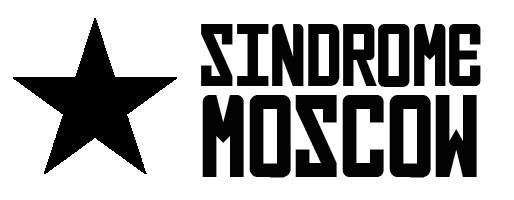 Logo Síndrome Moscow